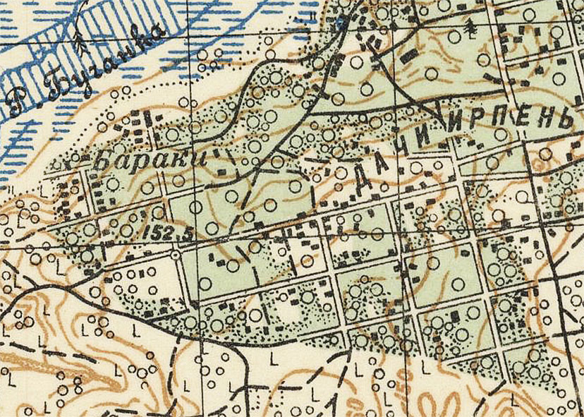 Бараки - місцевість, окреслена вул. Новооскольською, Гайдамацькою, Білокур і Гоголя. Урочище Пилипів Потік. Ірпінь. Фрагмент мапи РКЧА 1932